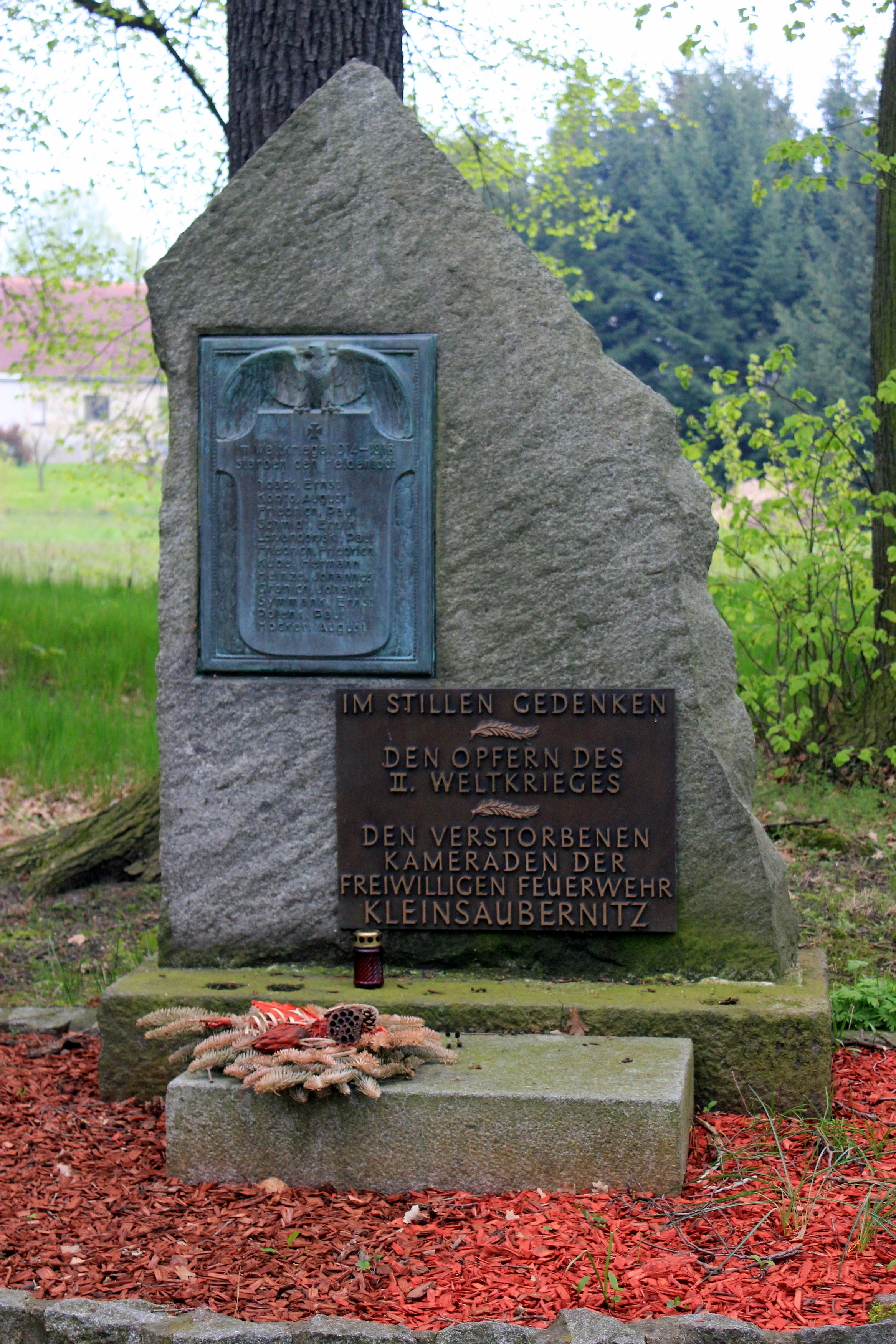 Hornjoserbsce: Wojerski pomnik w Zuborničce.